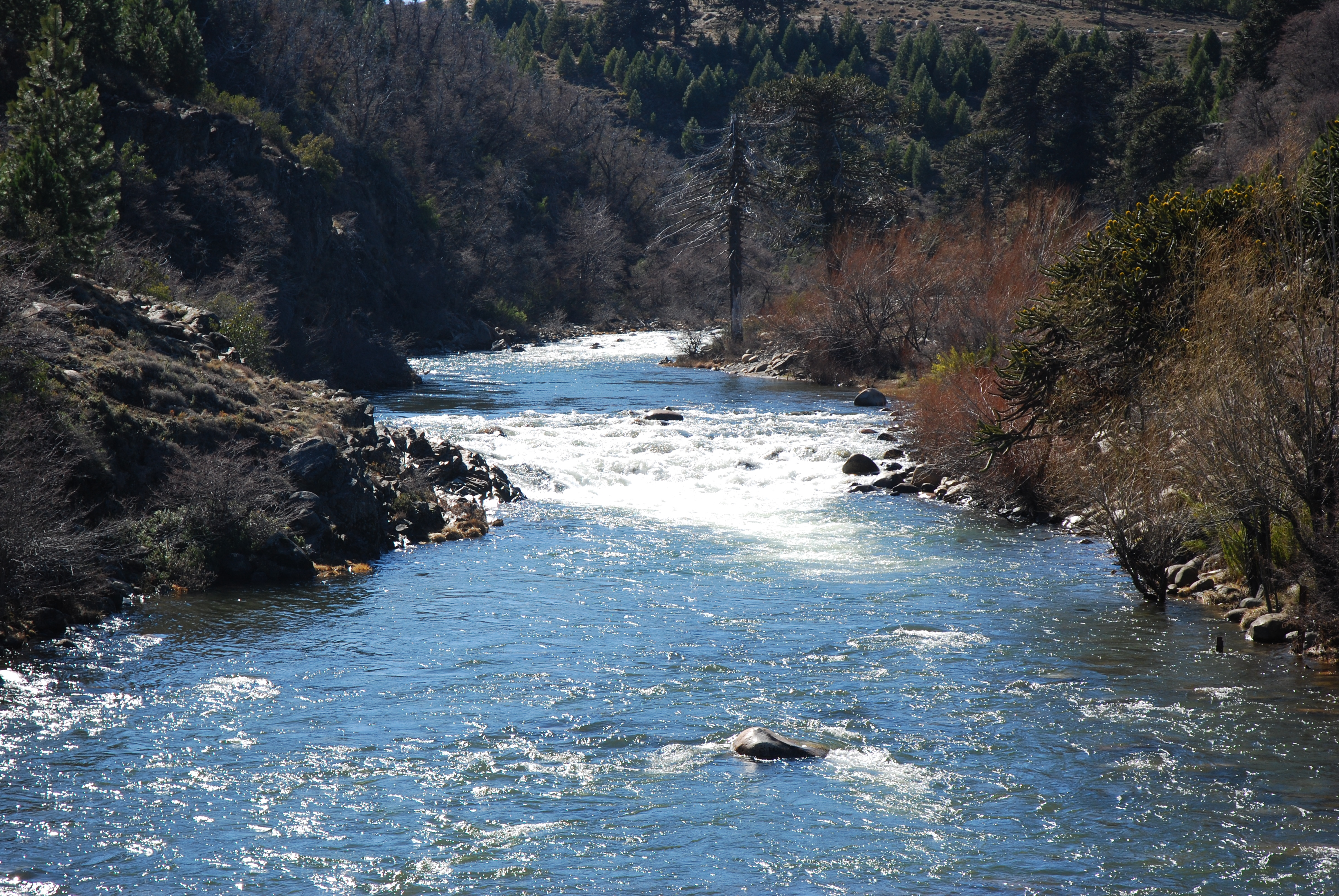 Río Litran, imagen tomada desde el puente homónimo sobre ruta13